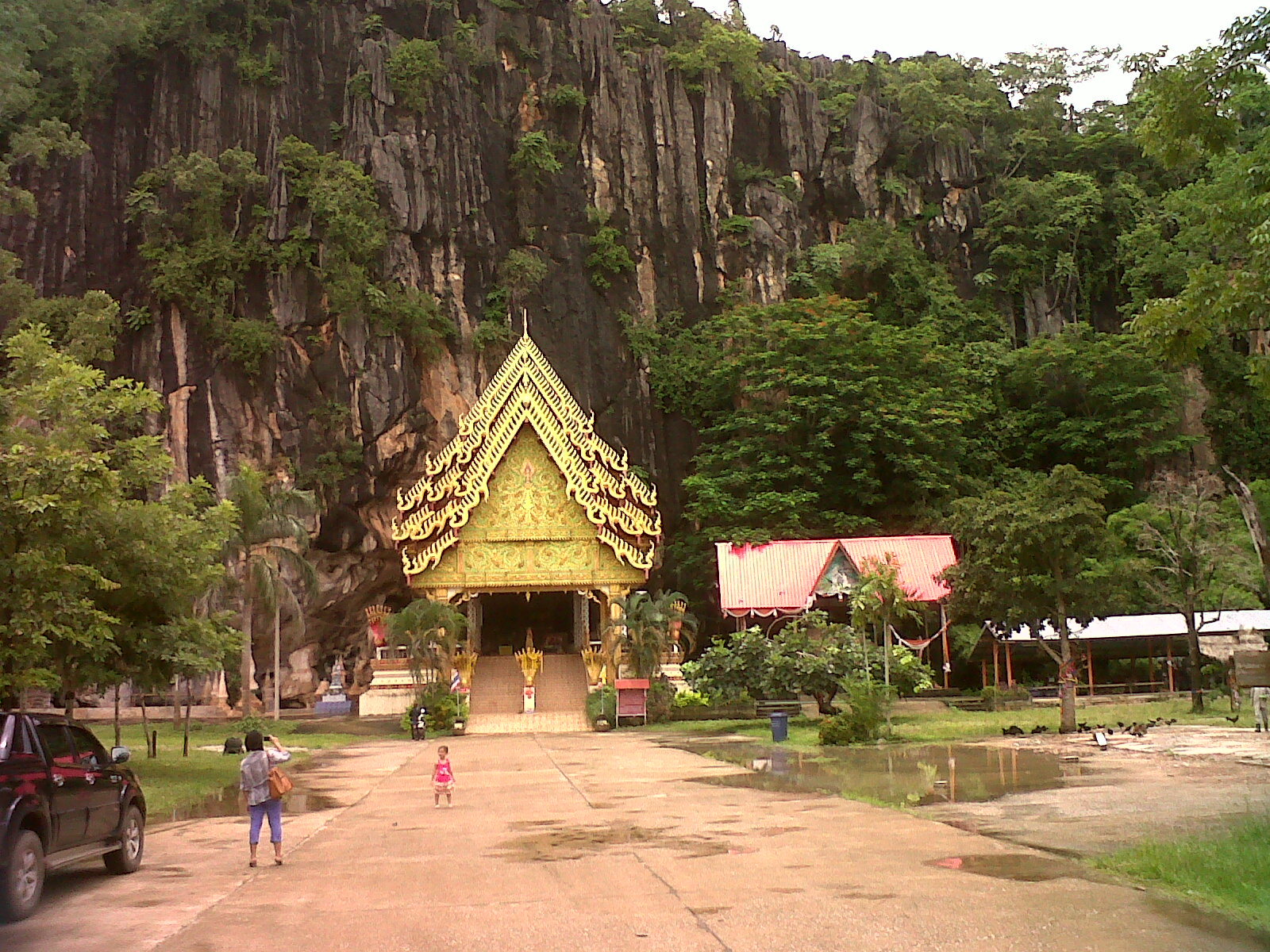 Wat Tham Suwannakuha